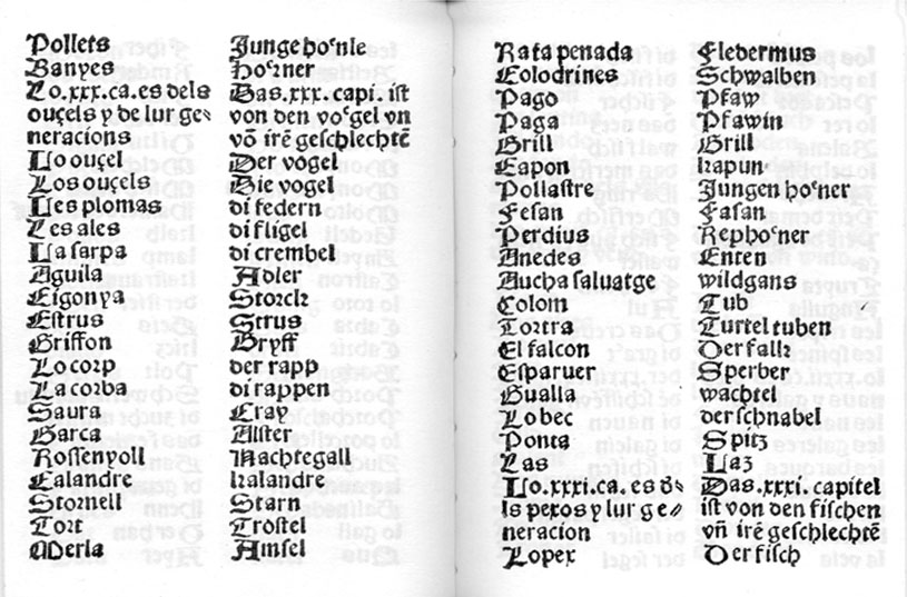 Reproducció de pàgina del llibre "Vocabulari molt profitos per apendre Lo Catalan Alamany y Lo Alamany Catalan" de Joan Rosembach (any 1502)